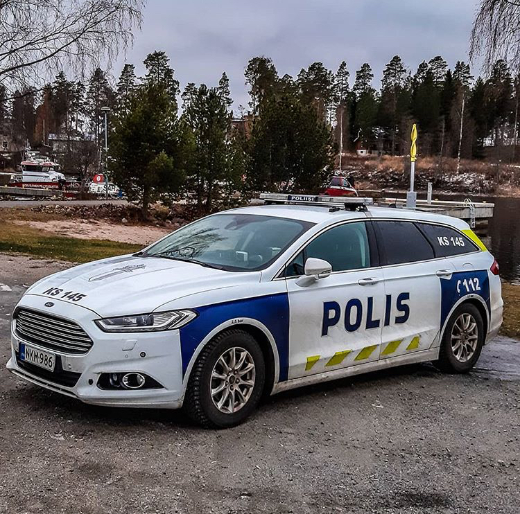 Poliisiauto mondeo